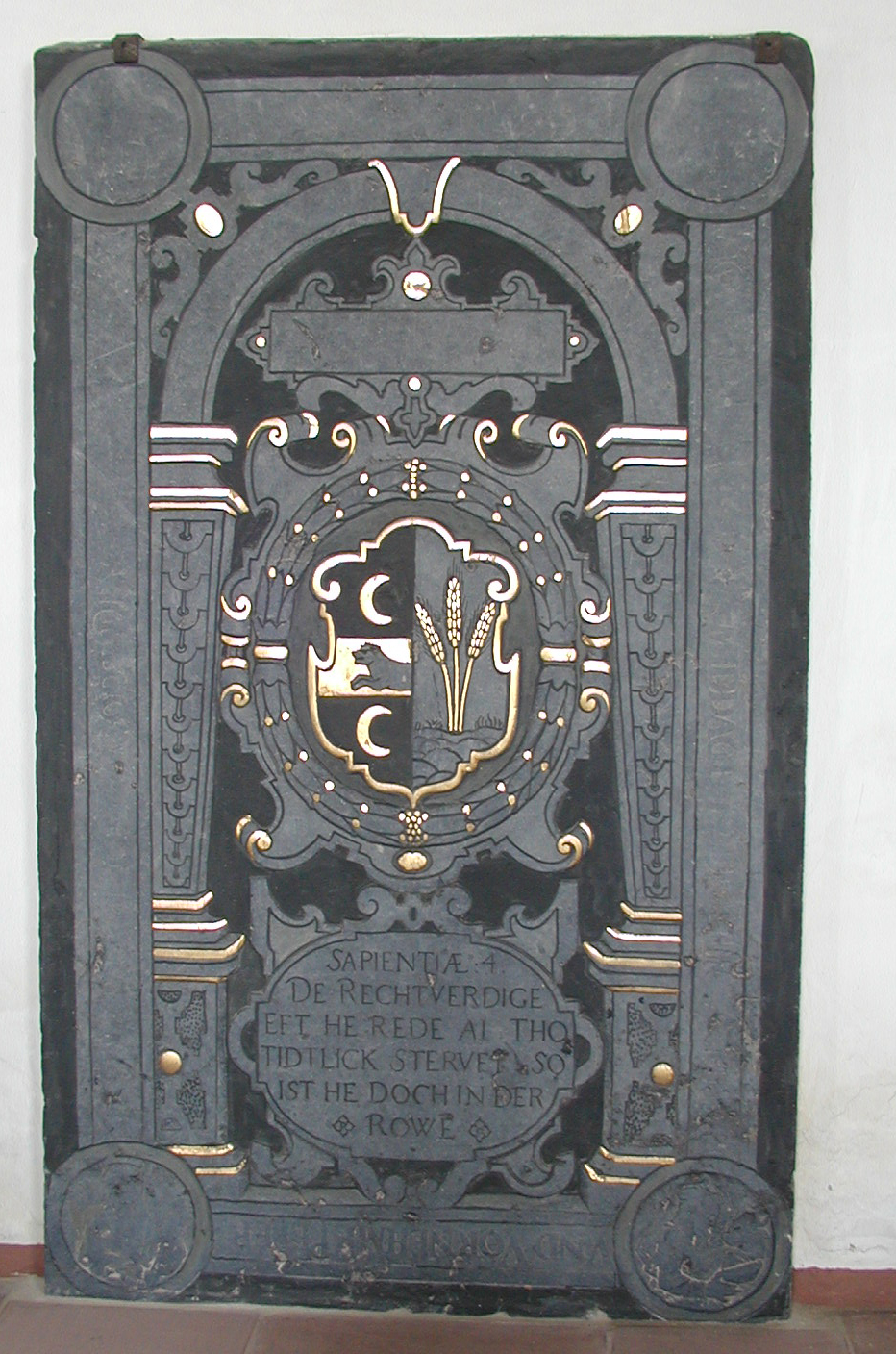 Grabstein in der Kirche von Bülkau